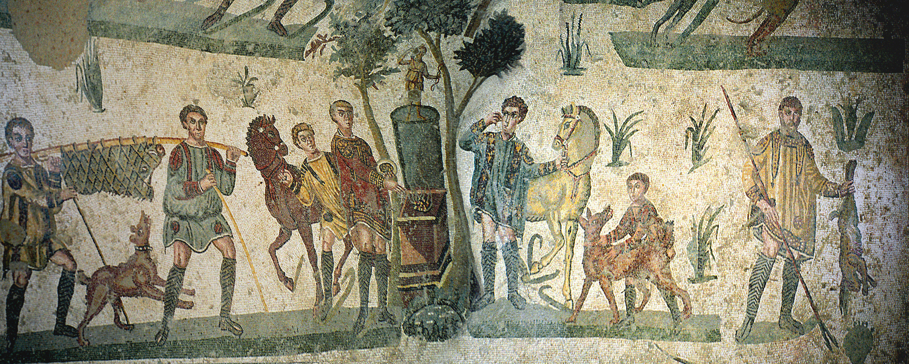 Sicily, Villa Romana del Casale